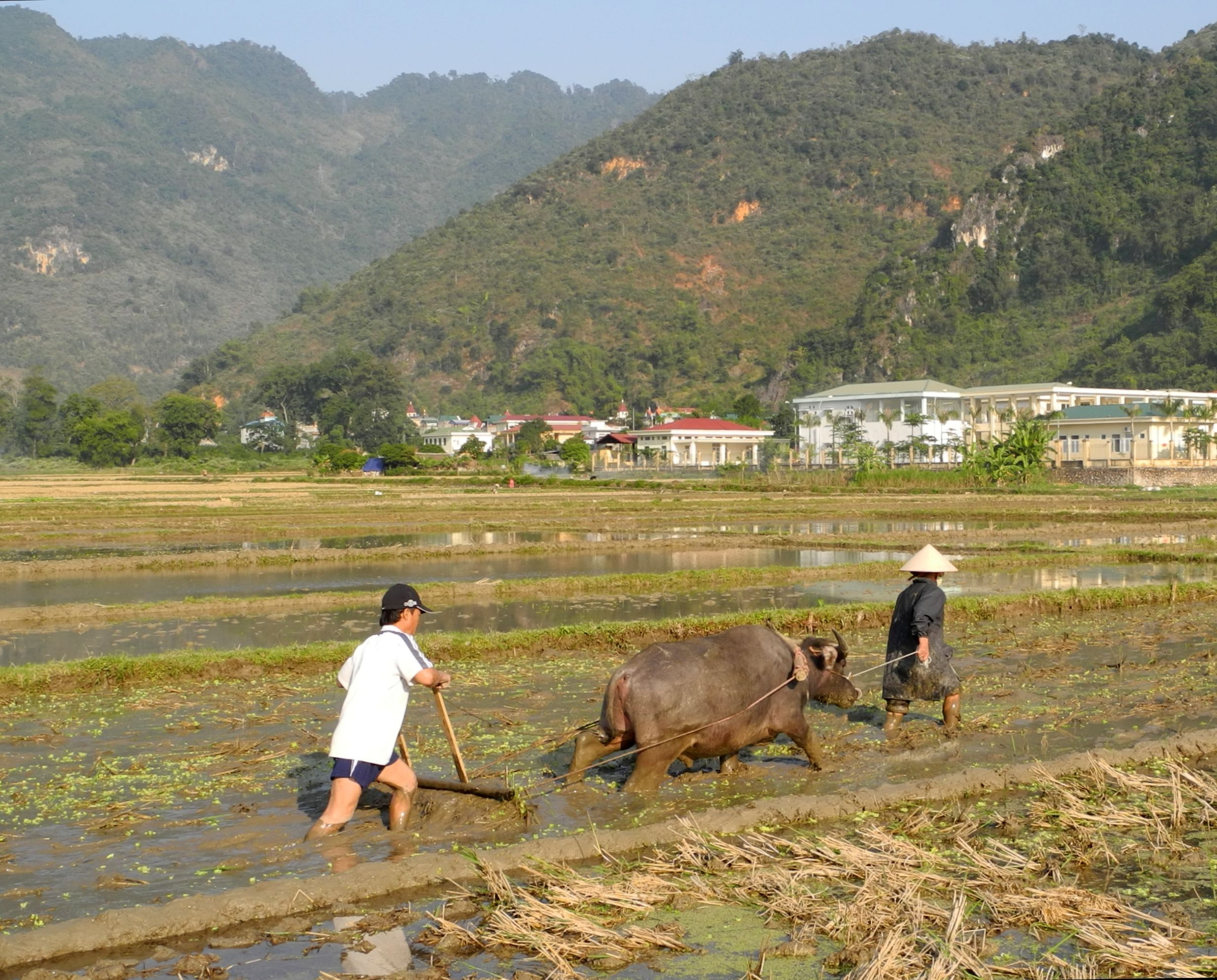 Mai Chau-Arbeit mit Wasserbüffel im Reisfeld